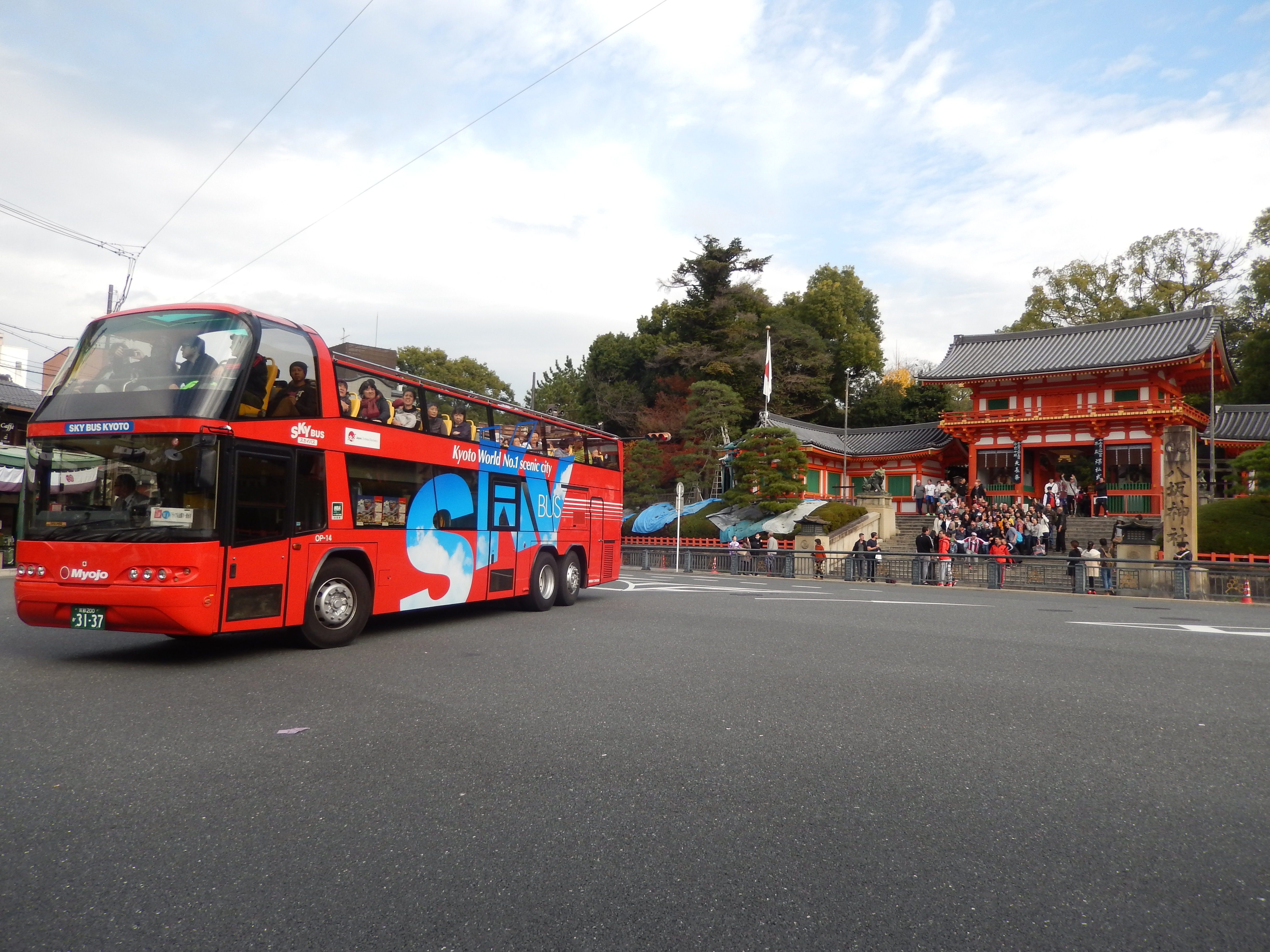 八坂神社前の祇園交差点を行くスカイバス